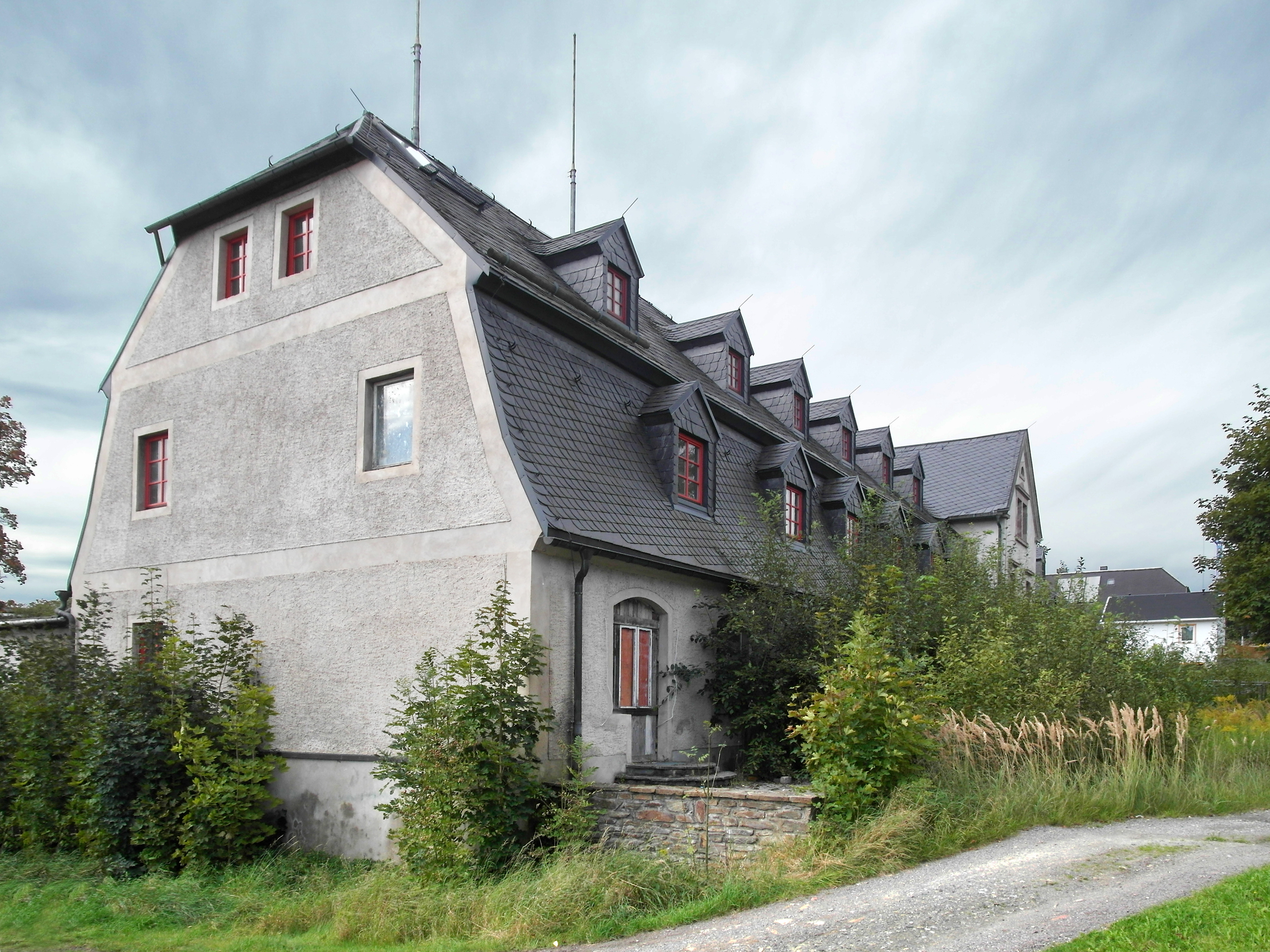 11.09.2017 09488 Wiesa (Thermalbad Wiesenbad), Am Rittergut 15 (GMP: 50.612815, 13.016554): Das stattliche, langgestreckte ehemalige Wirtschaftsgebäude (GMP: 50.612666,13.016235) ist vor einigen Jahren aufwendig saniert worden mit schiefergedecktem Mansarddach und neuen Fenstern. Trotzdem steht es leer und wird schon zum Teil von Gestrüpp zugewuchert. Das Herrenhaus wurde 1946 abgetragen. [SAM1842.JPG]20170911100DR.JPG(c)Blobelt